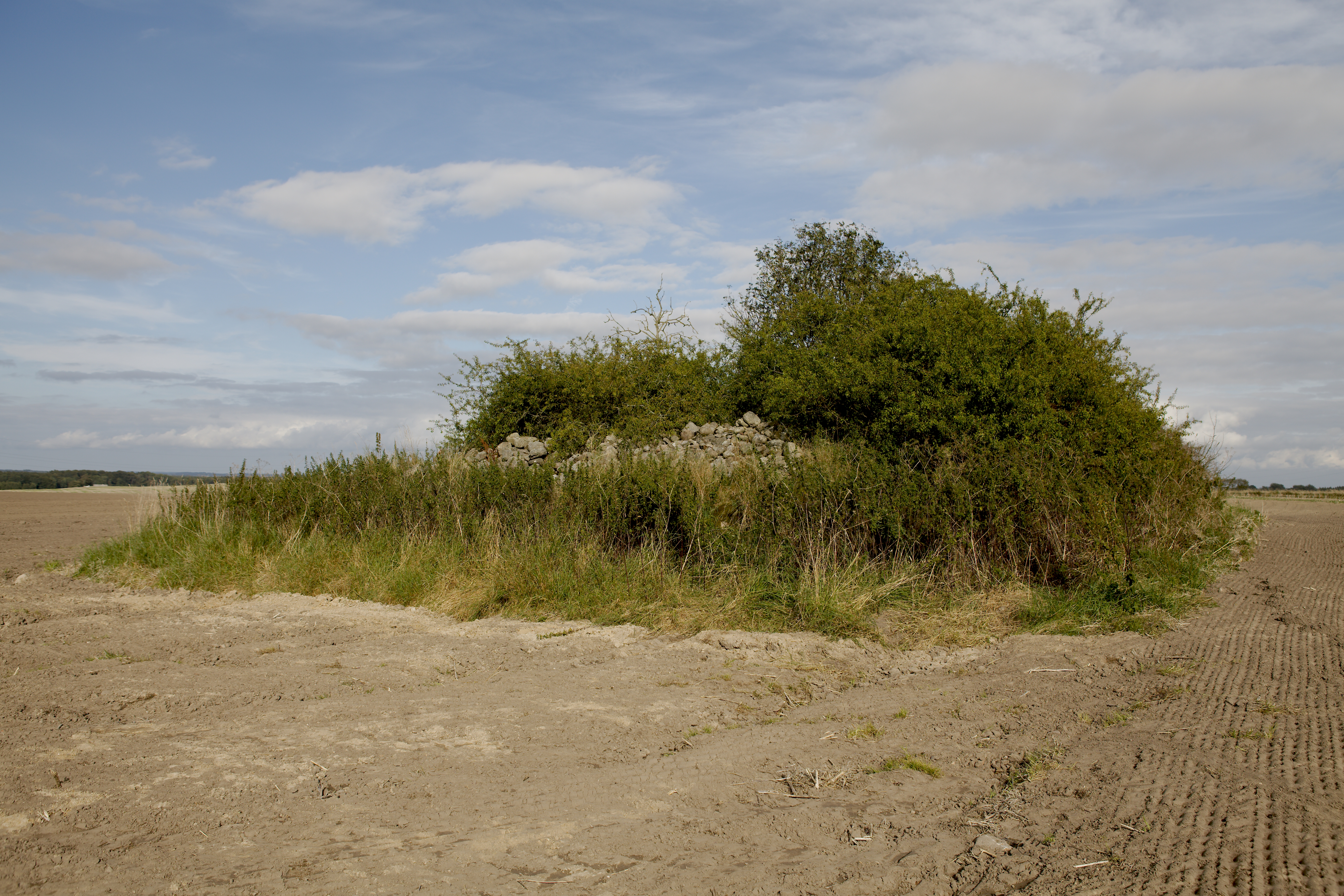 Skt. Nicolai kapel - groet til med tjørn og fyldt op med marksten